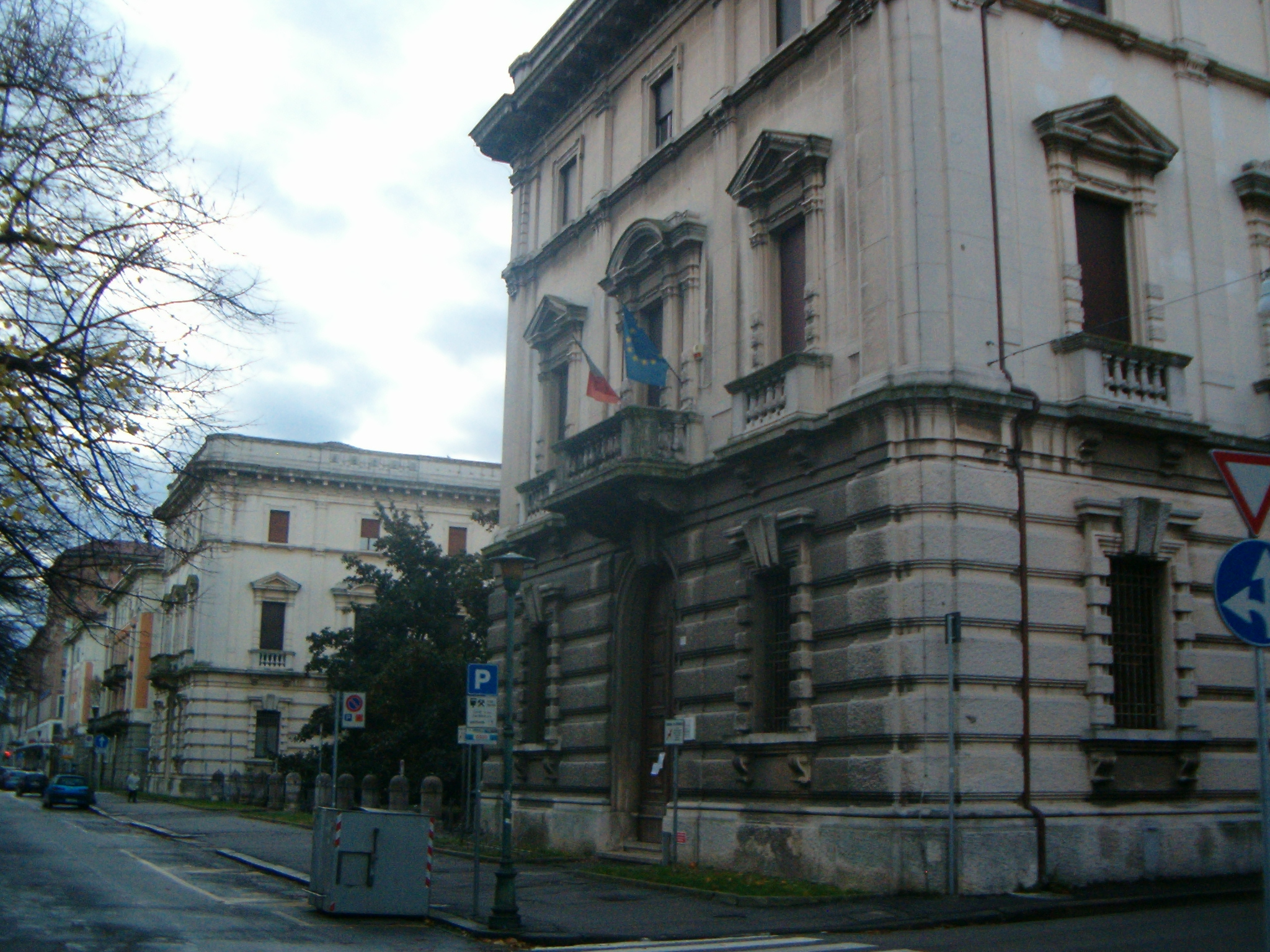 Ex Casa del Fascio - Ferrara - Ingresso Scuola Secondaria di I grado - novembre 2009